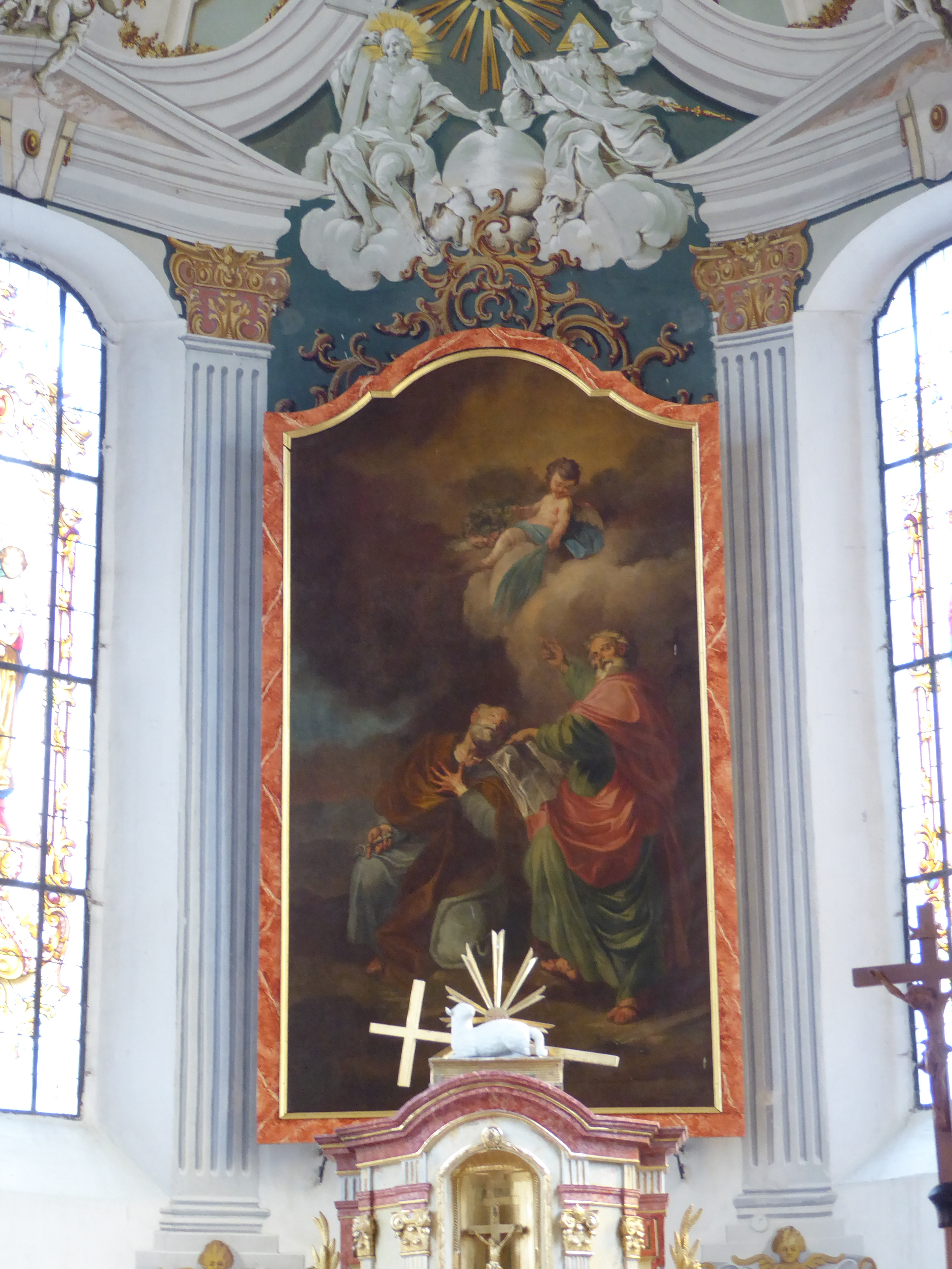 Pfarrkirche hll. Peter und Paulus, Drosendorf Altstadt, Drosendorf-Zissersdorf, Niederösterreich - Hochaltarbild hll. Petrus und Paulus